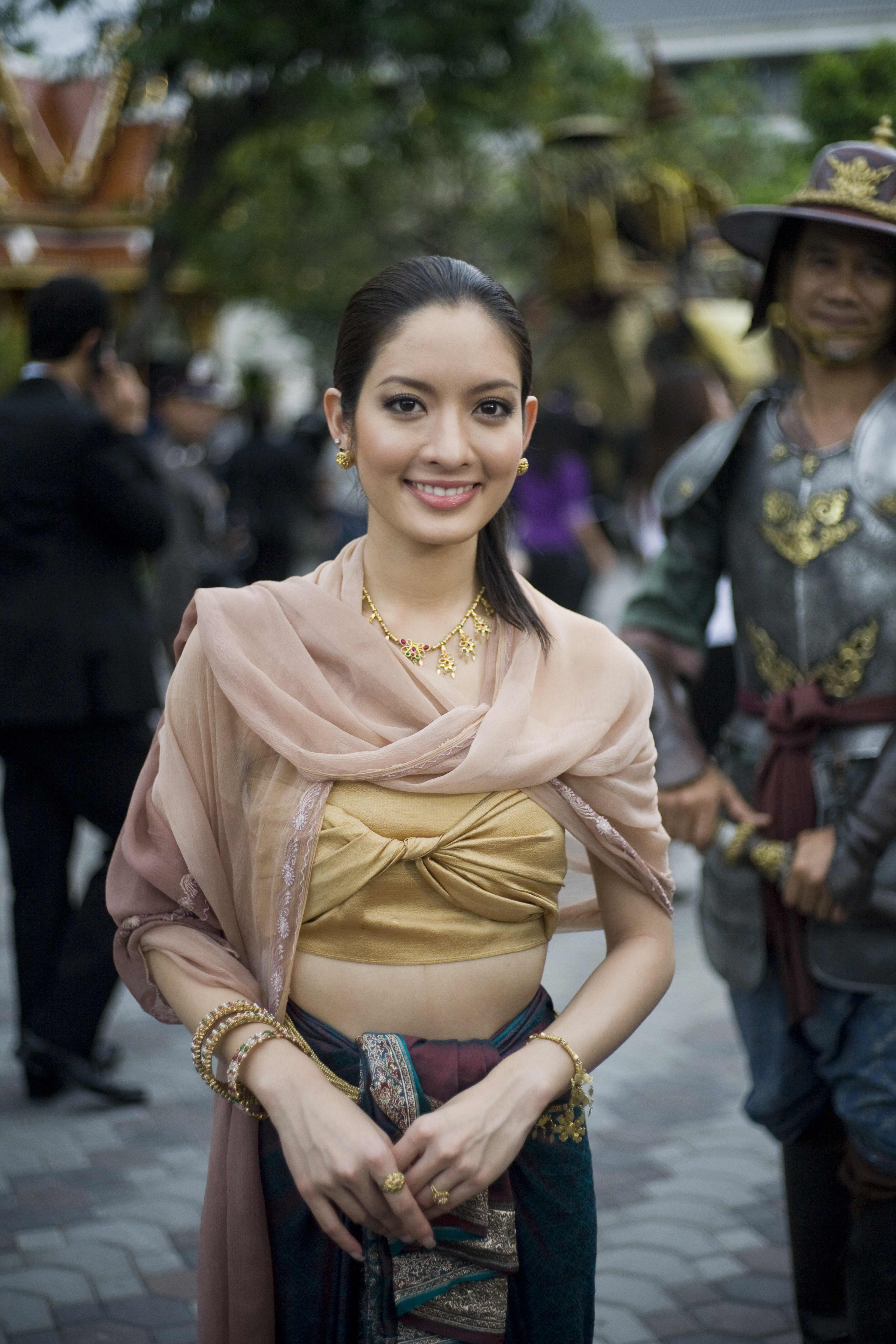 ทักษอร ภักดิ์สุขเจริญ / นายกรัฐมนตรี แถลงข่าวรัฐบาลสนับสนุนการสร้างภายนตร์ตำนานสมเด็จพระนเรศวรมหาราช ภาค 3 และ 4 "สงครามยุทธหัตถี" ณ ศูนย์วัฒนธรรมแห่งประเทศไทย 8สิงหาคม2552 (The Official Site of The Prime Minister of Thailand Photo by พีรพัฒน์ วิมลรังครัตน์)